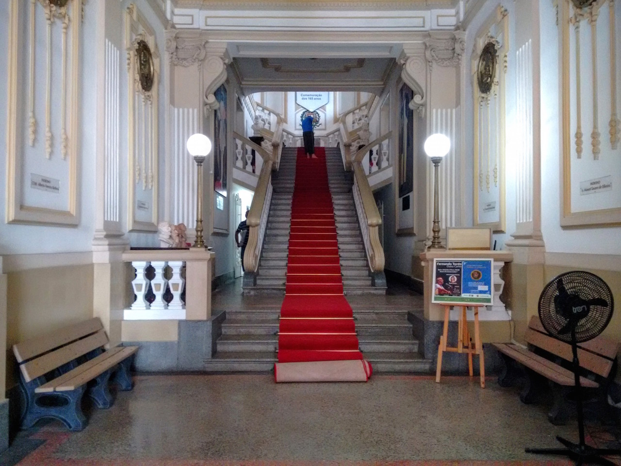 Salão de entrada do Gabinete Português de Leitura na rua do Imperador, no Recife, Brasil.